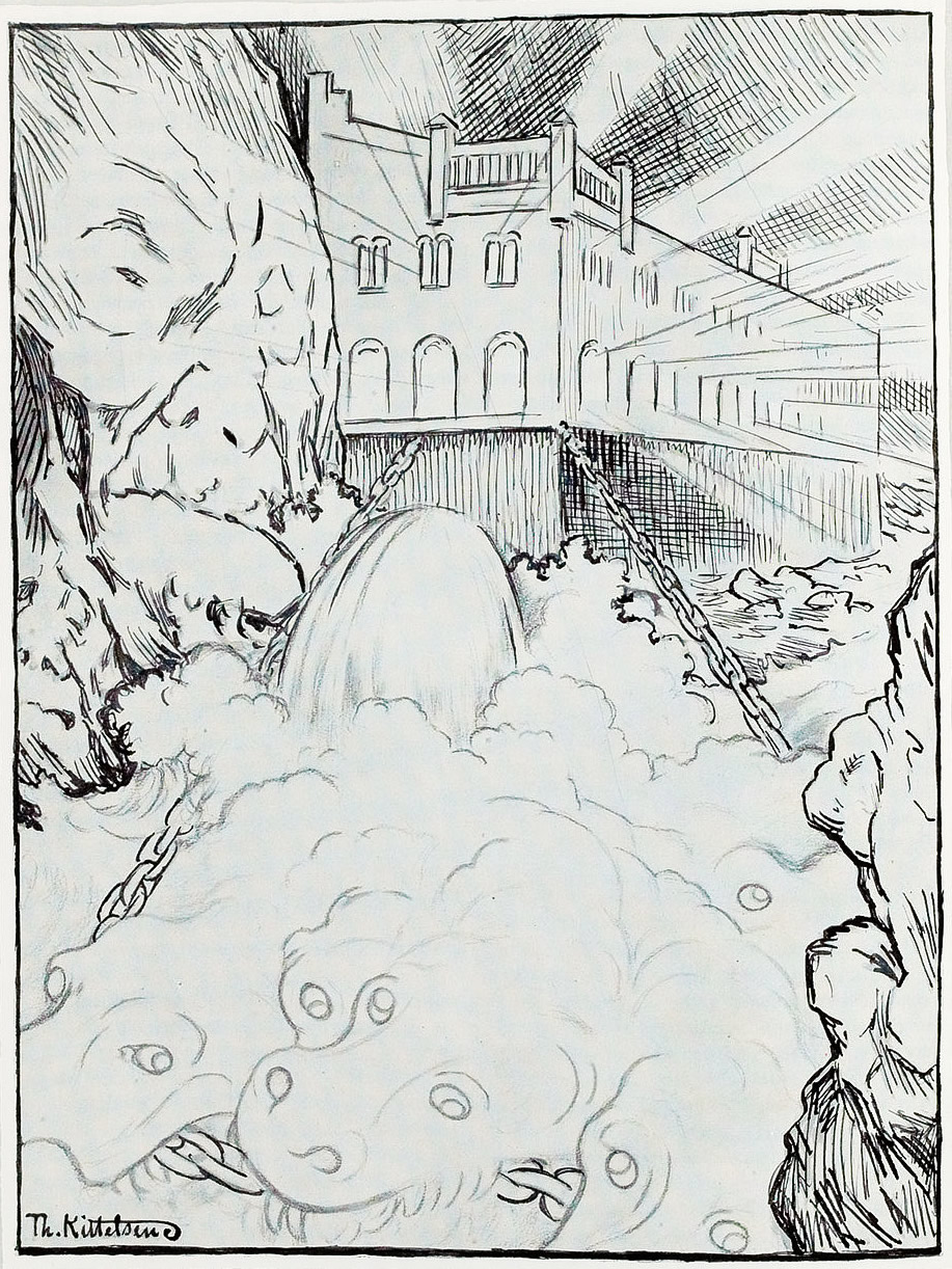 Skisse til tegning "Svælgfos"